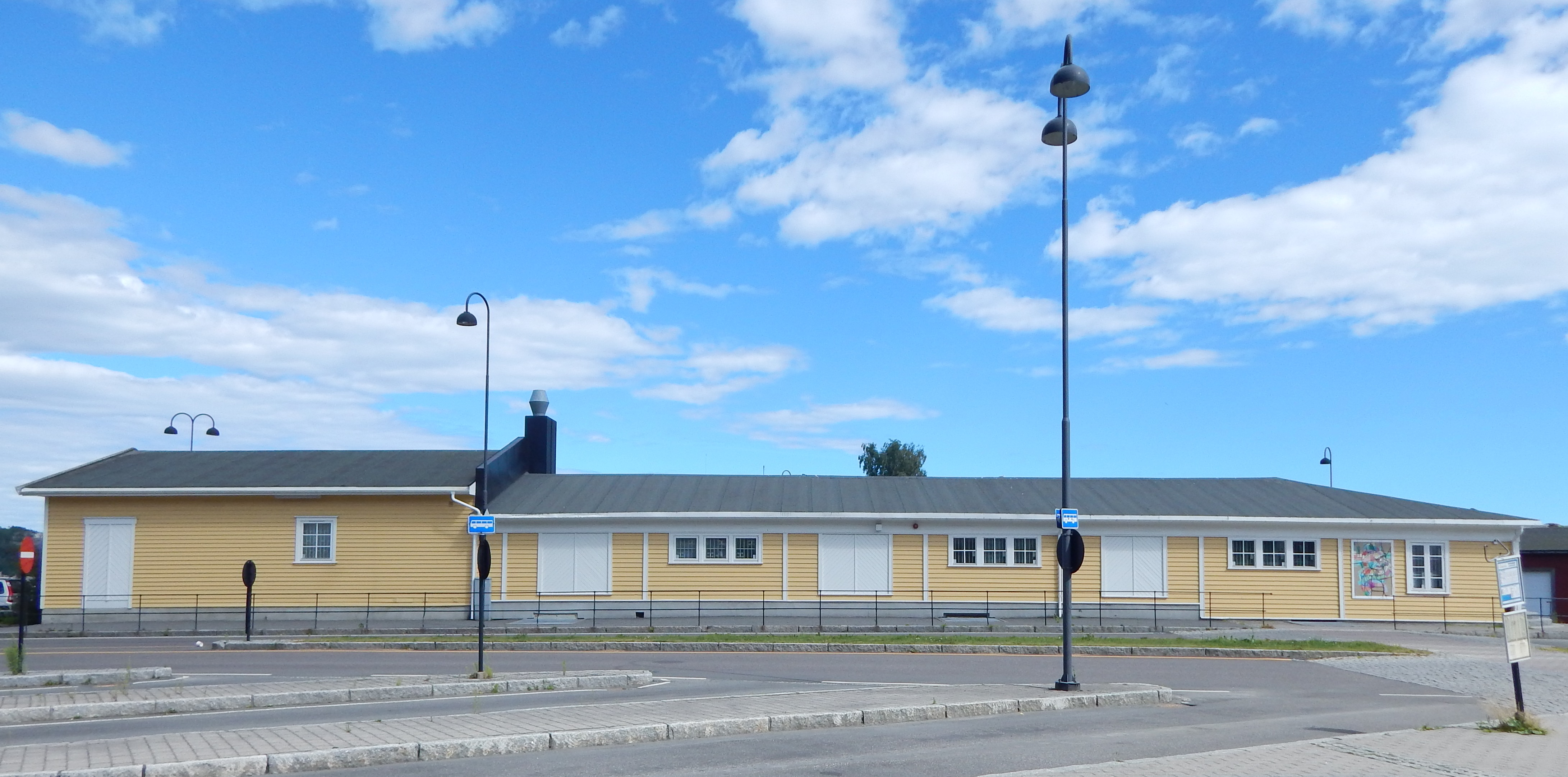 Kragerø godshus (ark. Gudmund Hoel og R. Werenskiold) huser i dag et utsalg av Vinonopolet. Foran huset går fylkesvei 38.